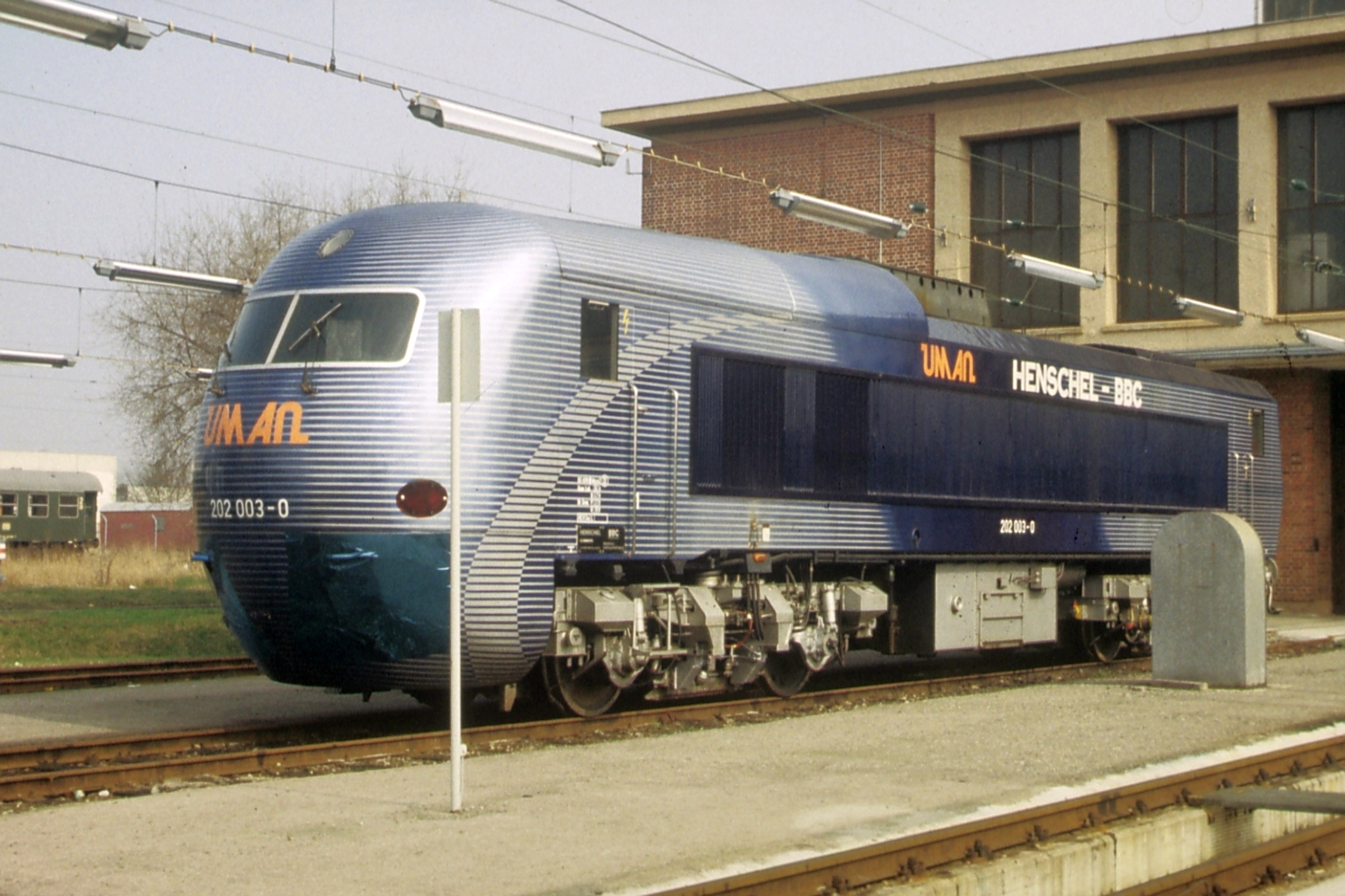 DB 202 003-0 als UmAn-Versuchslokomotive im AW München-Freimann